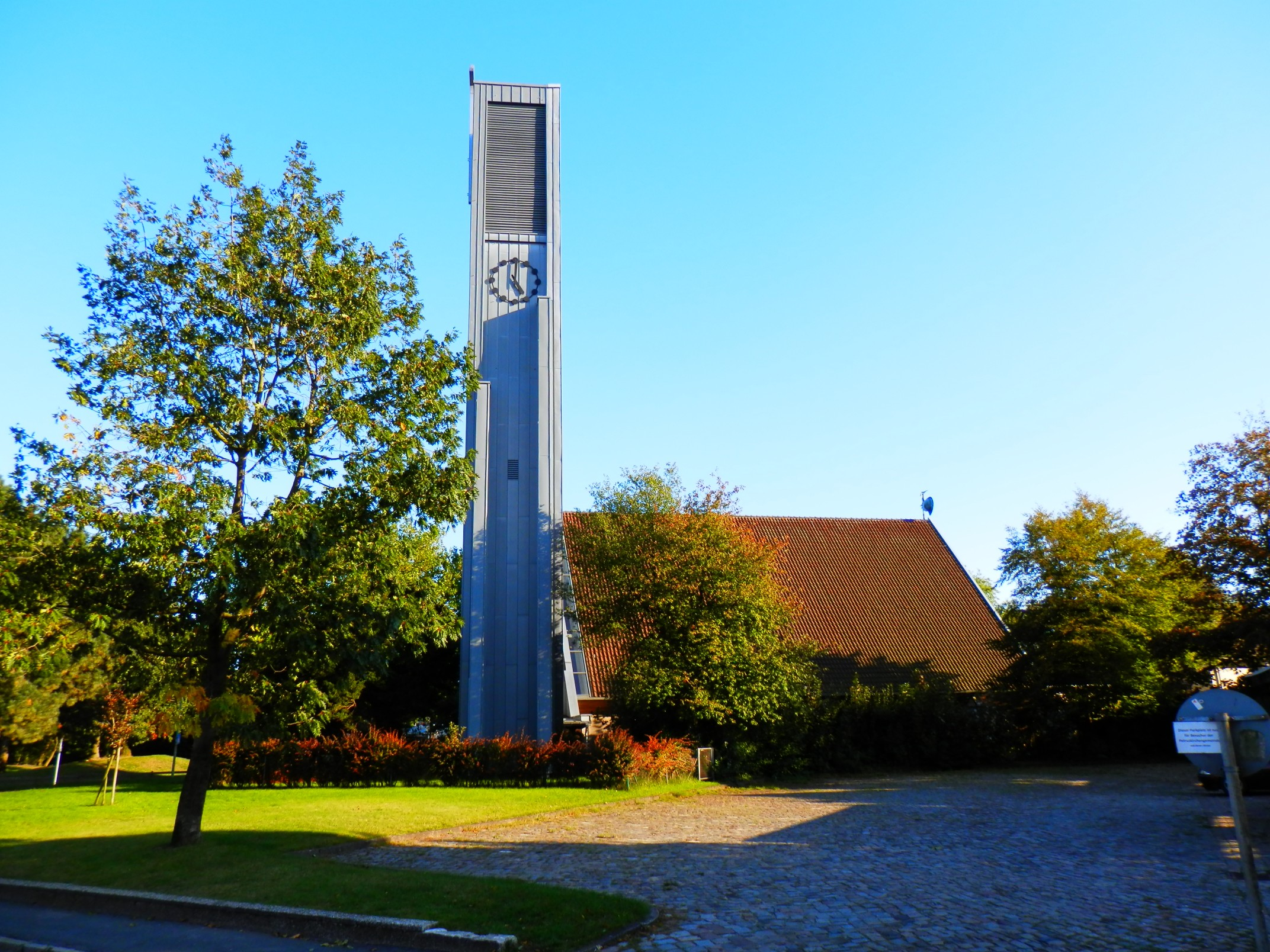 Ev.-Luth.-Petrus-Gemeinde in Bremerhaven, Haberstraße 18Das abgebildete Objekt ist ein geschütztes Kulturdenkmal in der Freien Hansestadt Bremen, mit der Nr. 3383 beim Landesamt für Denkmalpflege registriert.